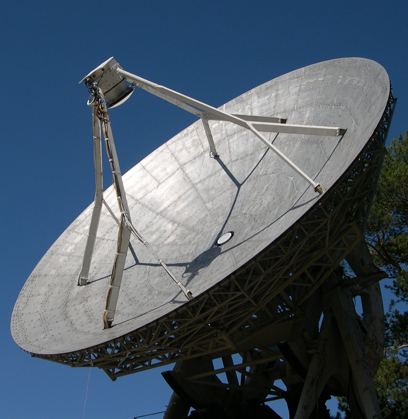 Радиотелескоп МГТУ им. Баумана